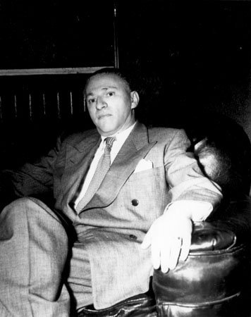 Portrait photographique de Fedor Ozep.